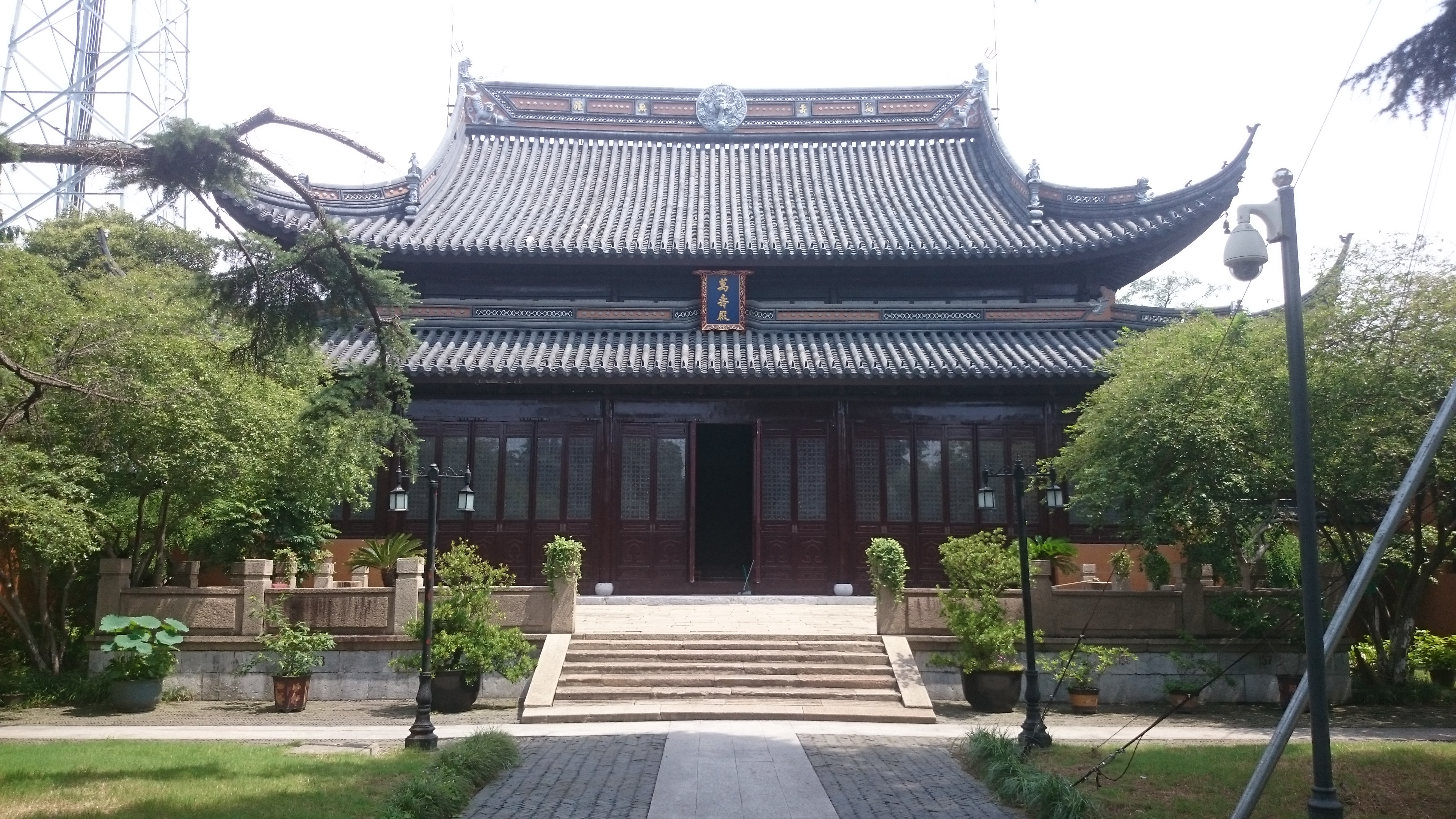 中文（中国大陆）: 苏州万寿宫 正殿 万寿殿